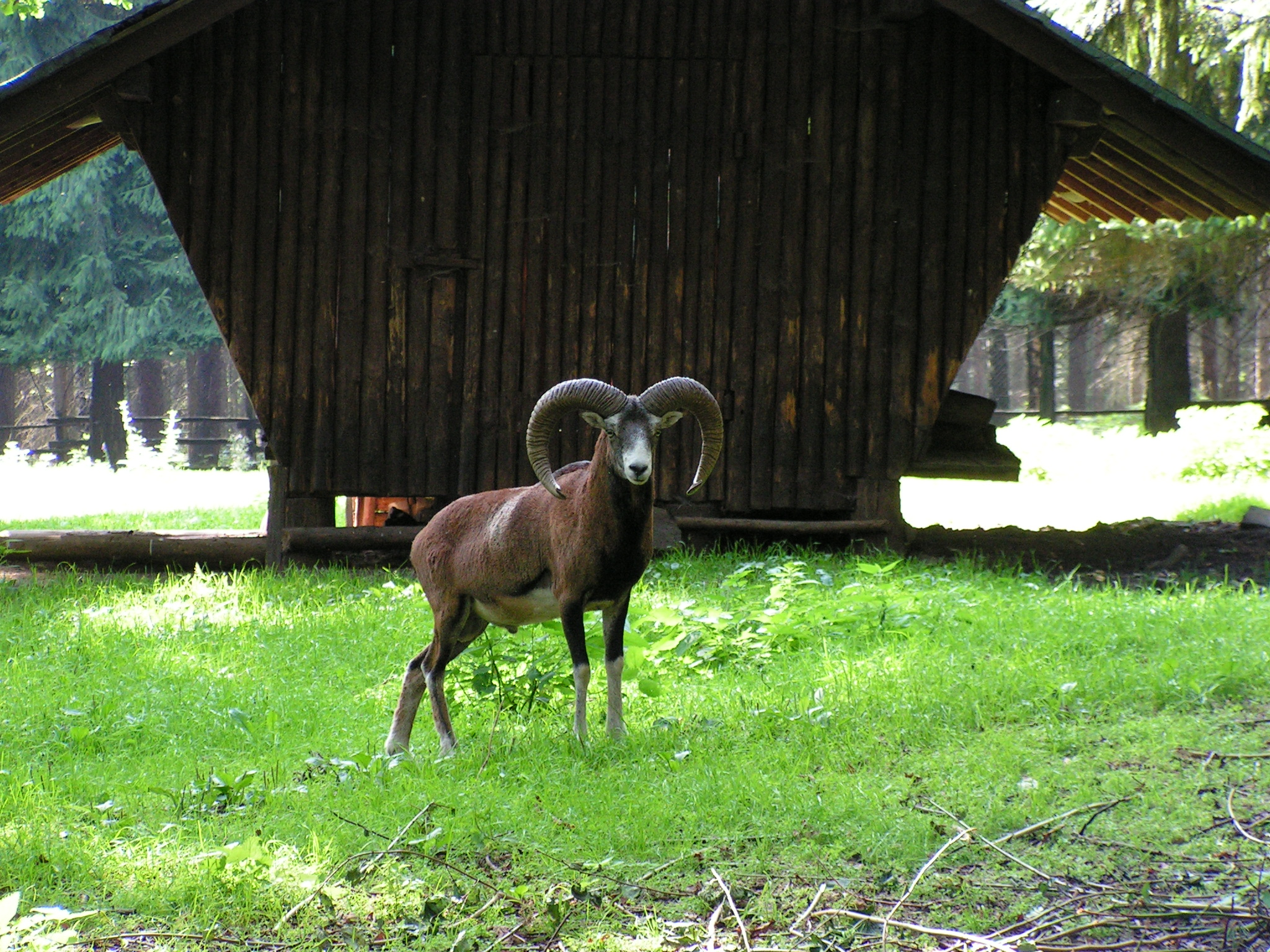 Ovis orientalis musimon